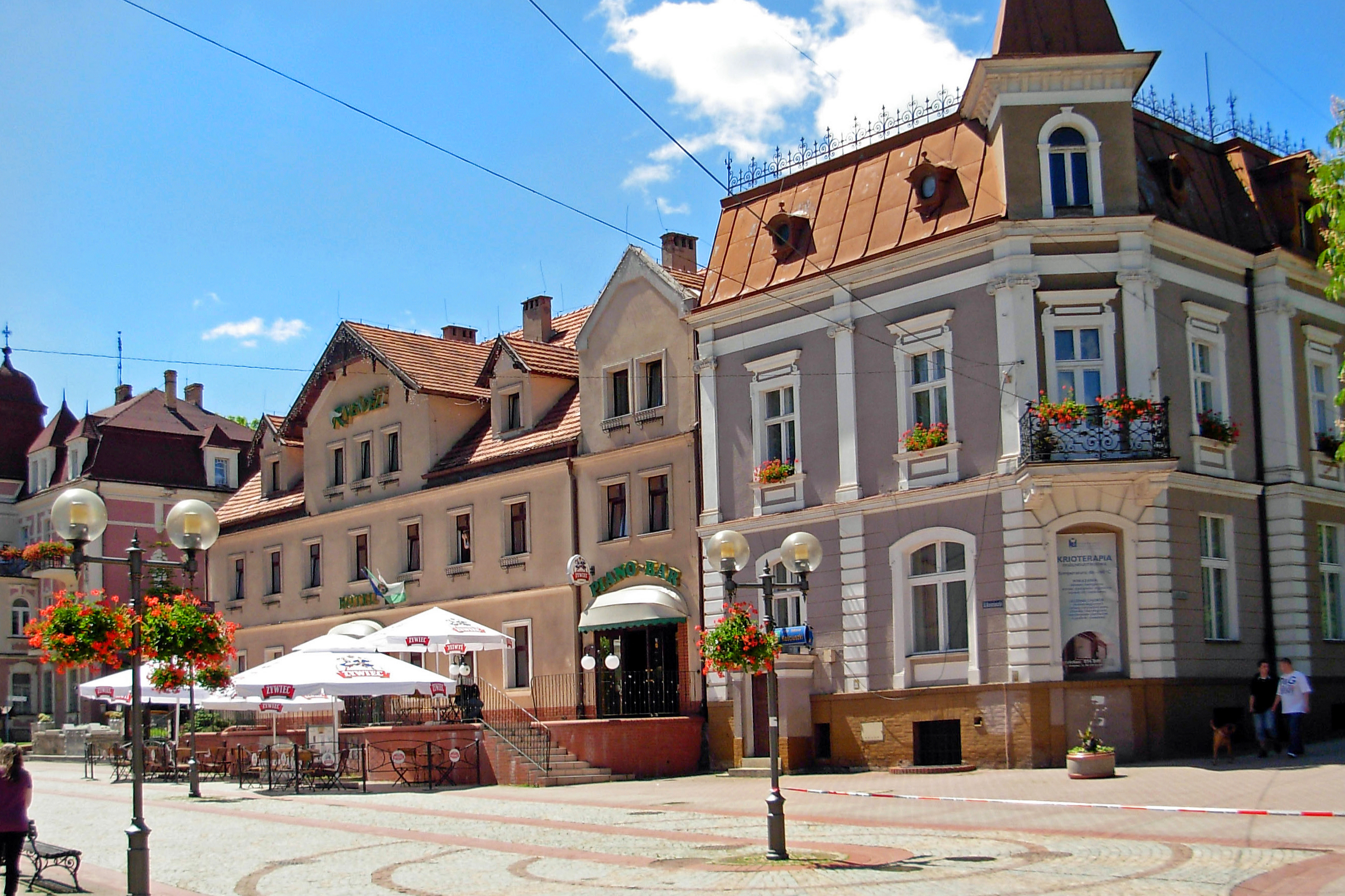 Szczawno Zdrój - Deptak